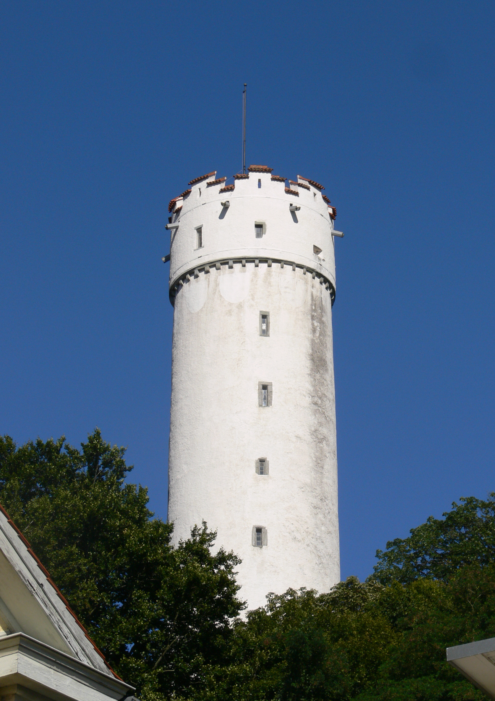 Ravensburg, Mehlsack von der Oberamteigasse aus gesehen